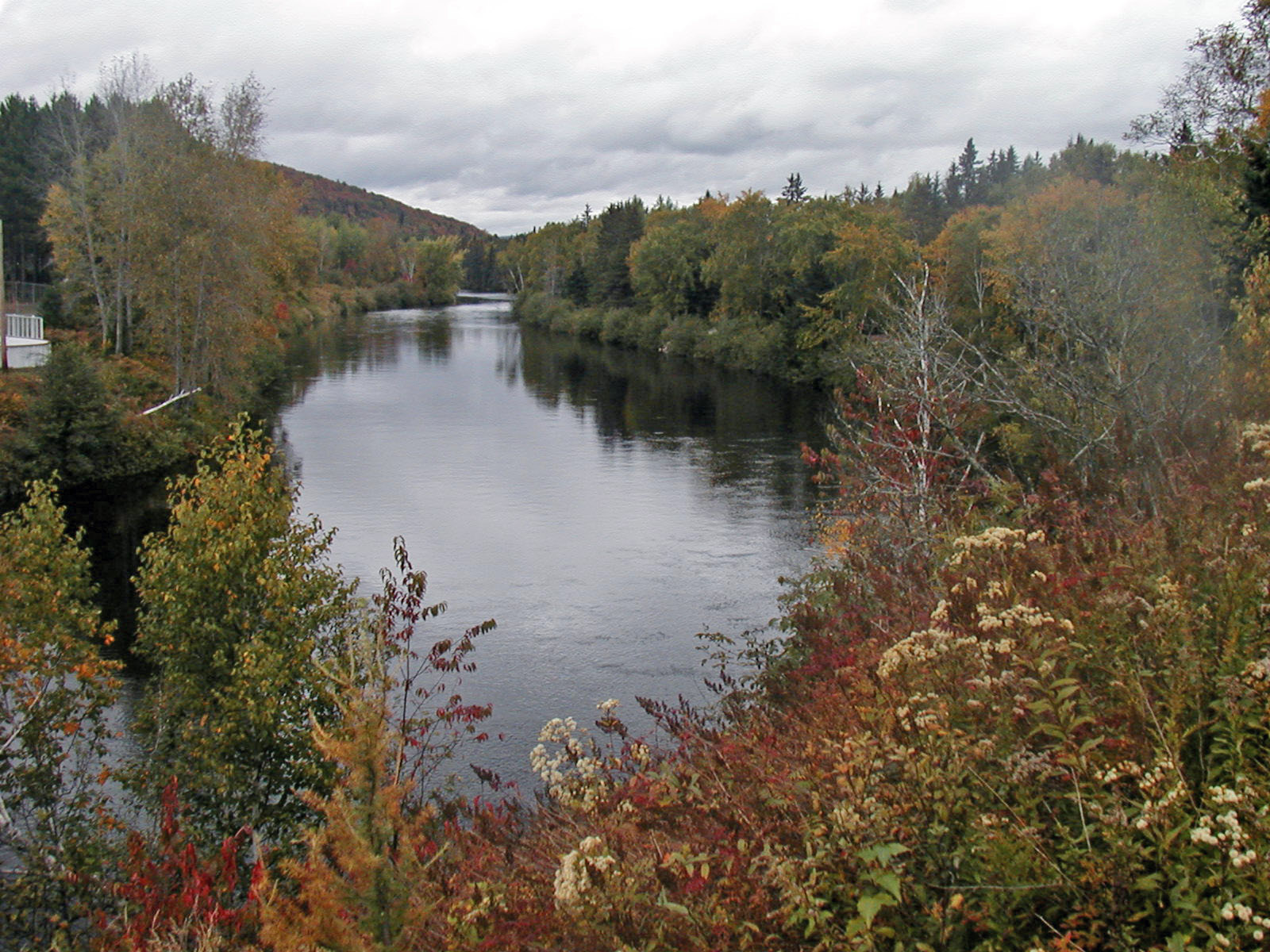 Rivière Rouge vue du pont de L'Ascension.